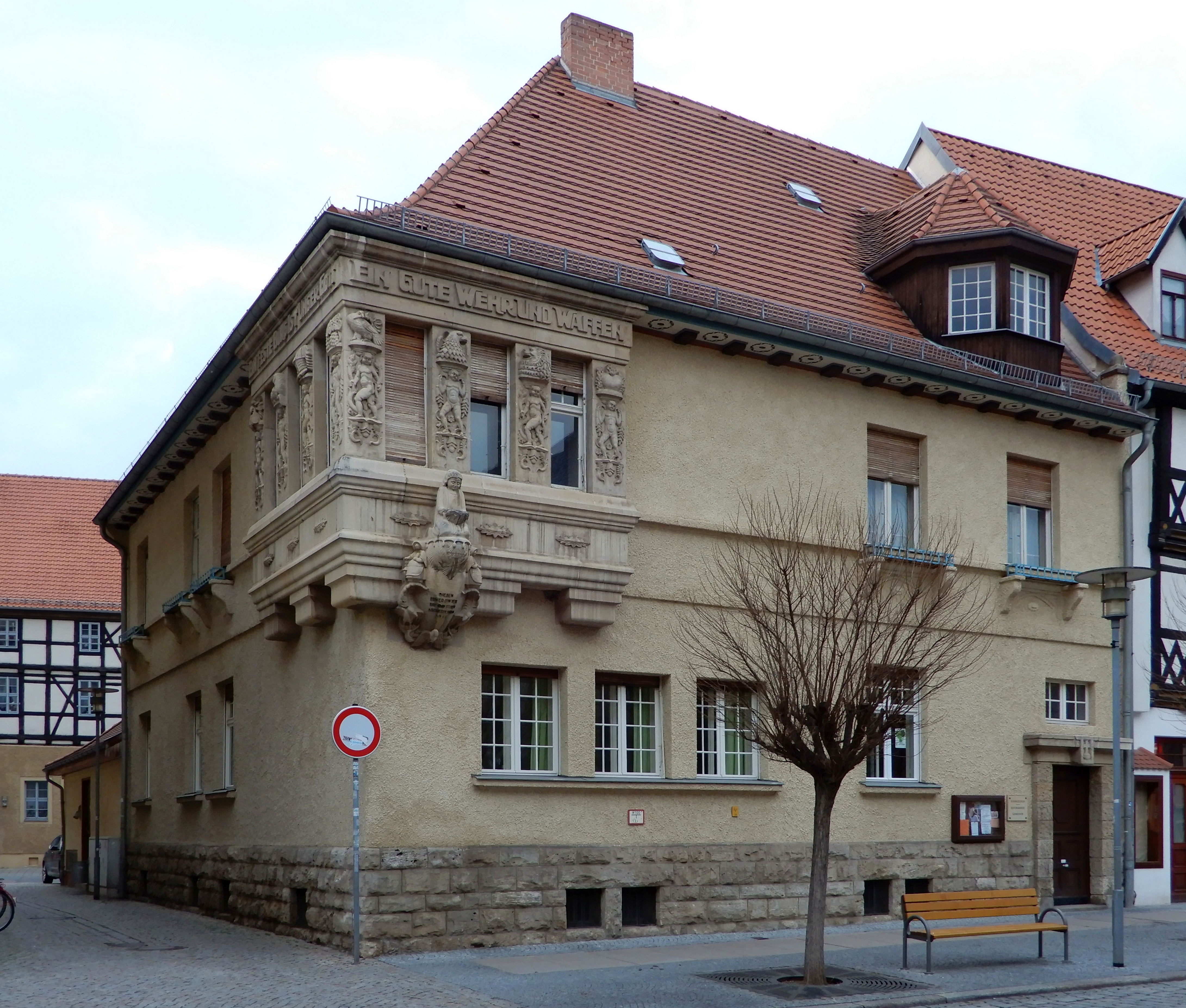 Gebäude Markt 28 in Aschersleben